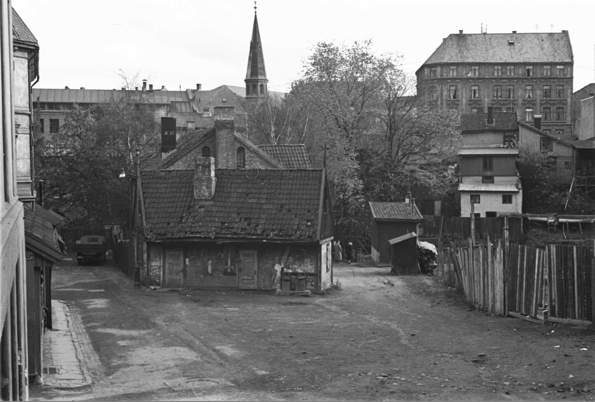 Slåmotgangen sett fra Christian Krohgs gate mot Akerselva. På andre siden av elva Lakkegata og Østre frikirke.